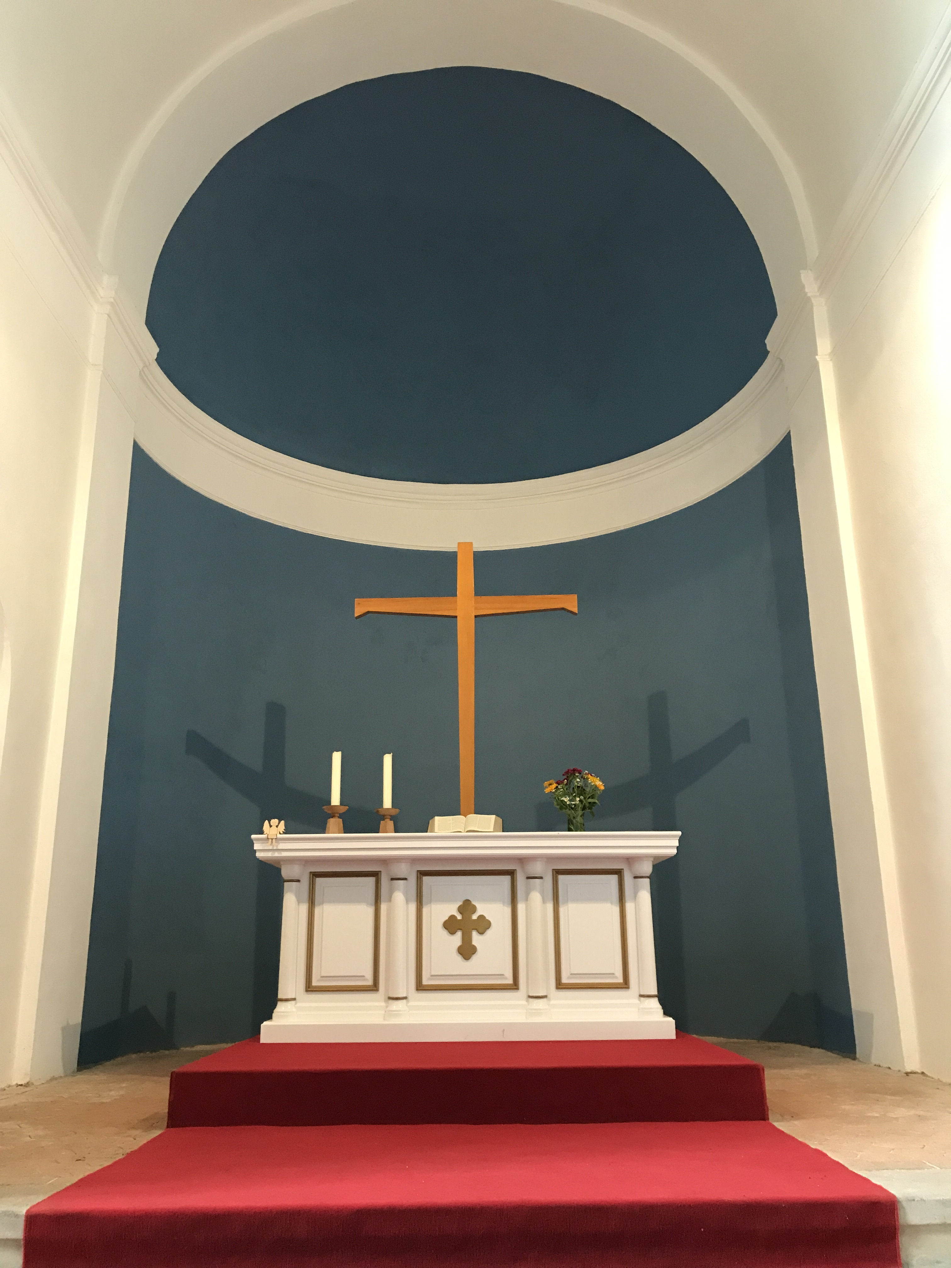 Die Dorfkirche in Selchow ist ein neuromanischer Bau, der in den Jahren 1865 und 1866 nach Friedrich August Stüler erbaut wurde. In dem Bauwerk in Storkow (Mark) befindet sich unter anderem ein Triptychon der Künstlerin Renate Niethammer.